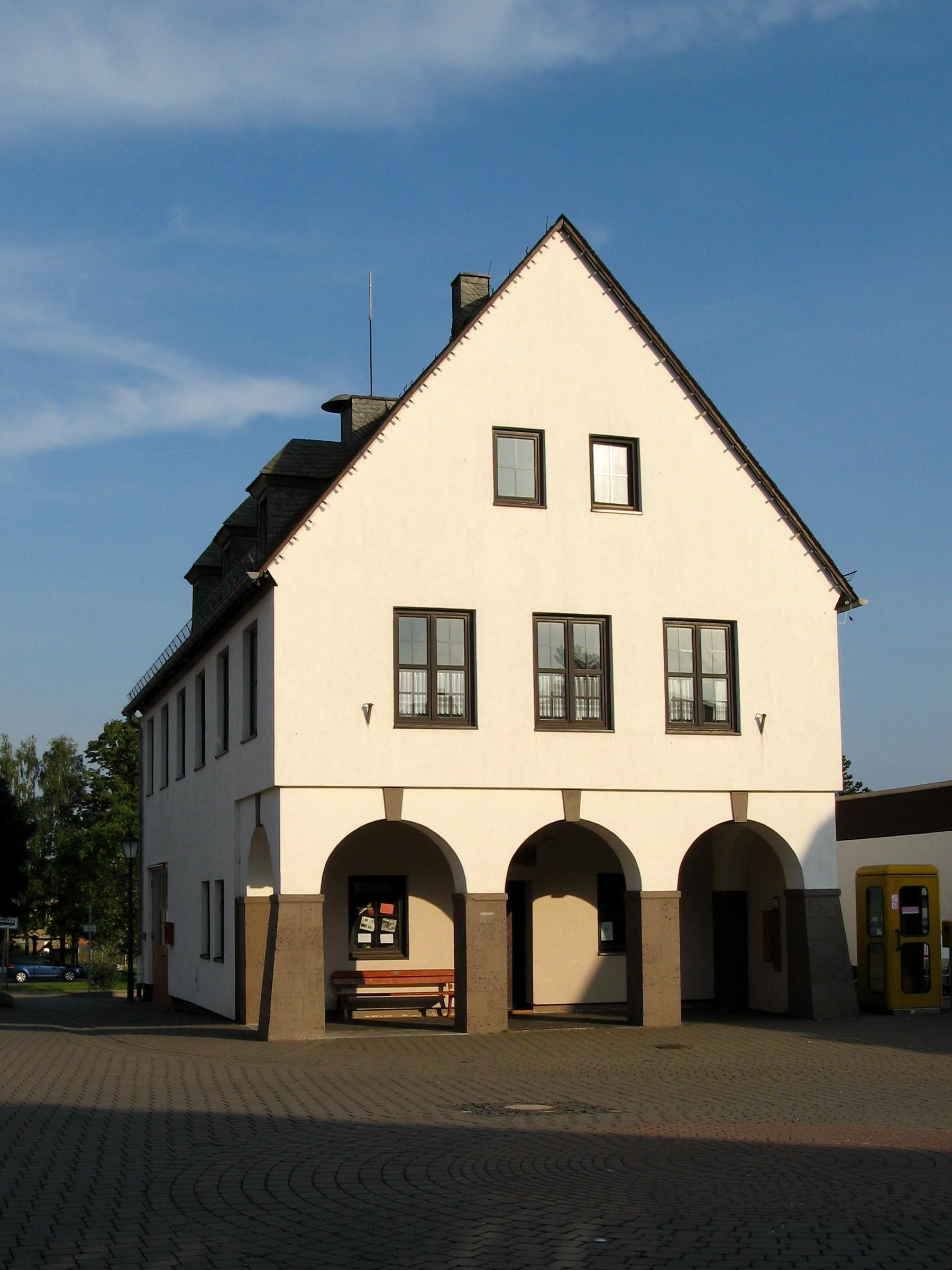 Altes Backhaus in Greifenstein, heute Sitz der Feuerwehr